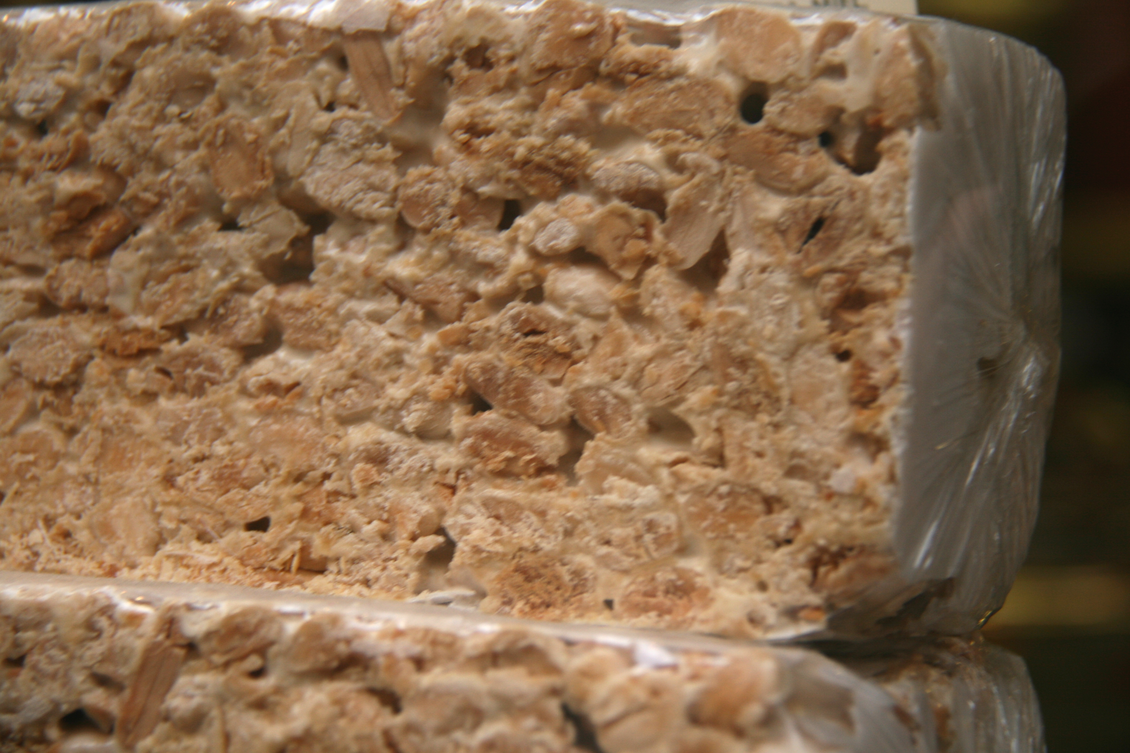 Turrón (Casa Mira)